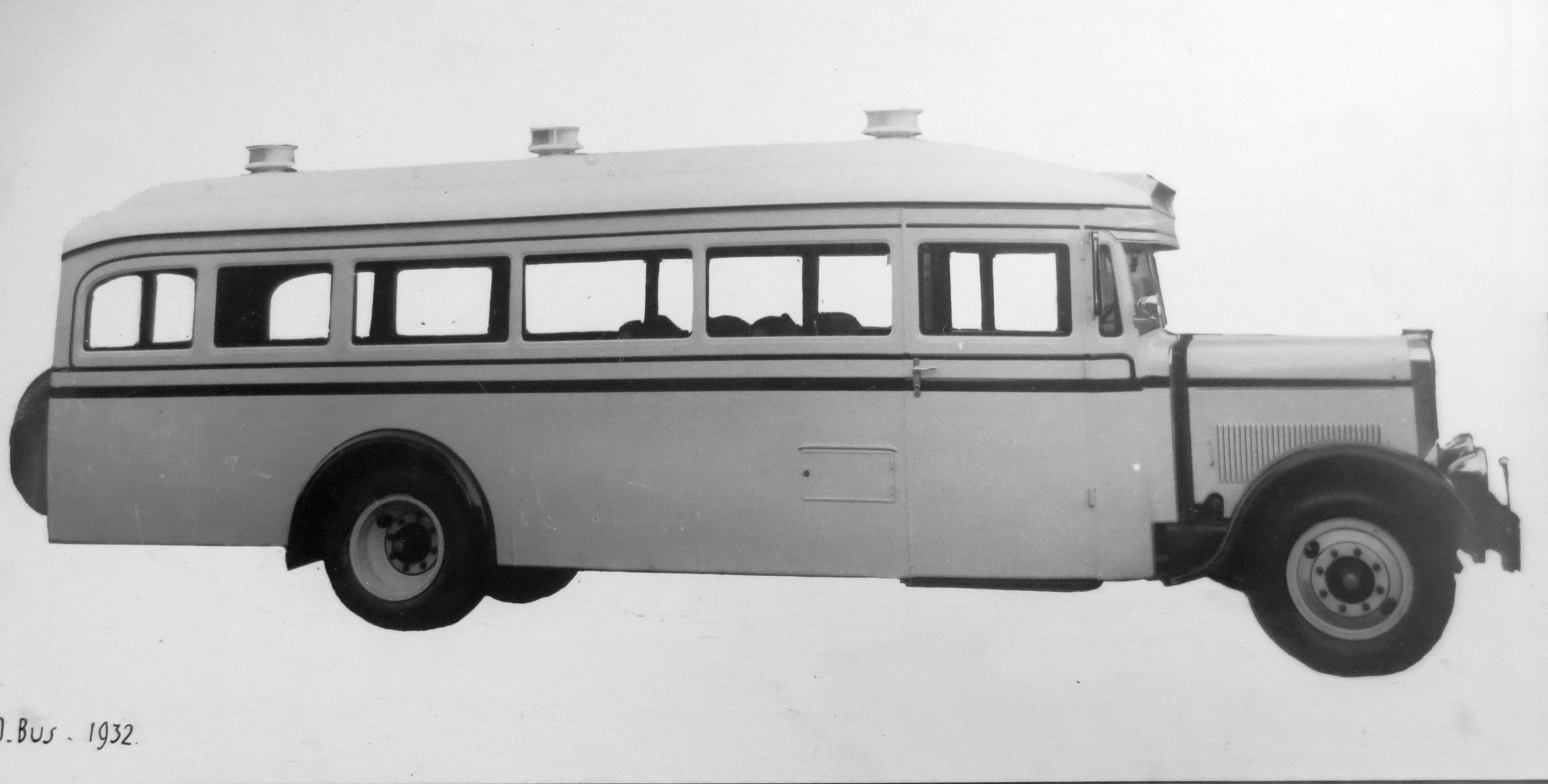 autobus Walter D-Bus (1932)